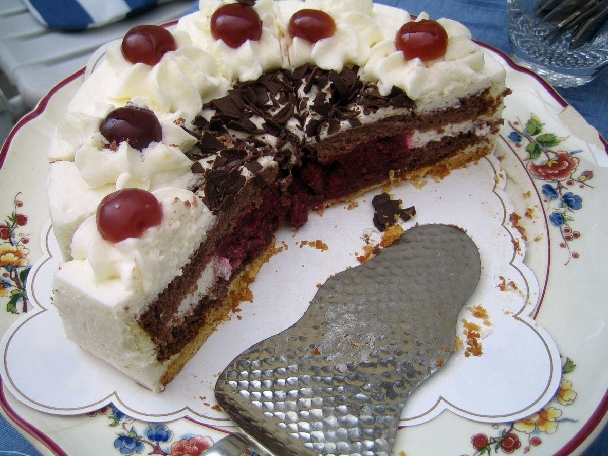 Eine halbe Sahnetorte